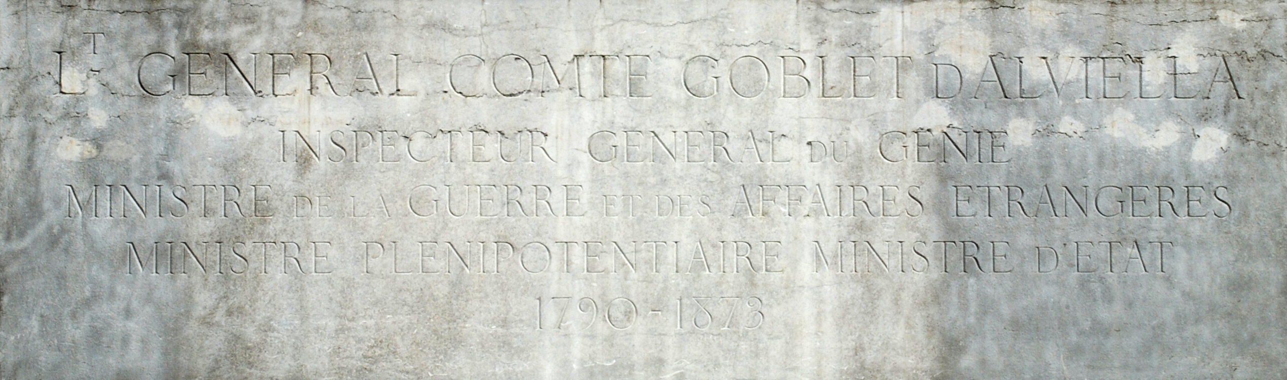 Belgique - Brabant wallon - Court-Saint-Etienne - Monument au comte Goblet d'Alviella